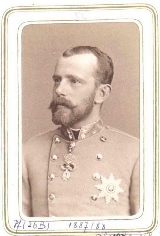 Rudolf von Österreich-Ungarn (1858-1889)